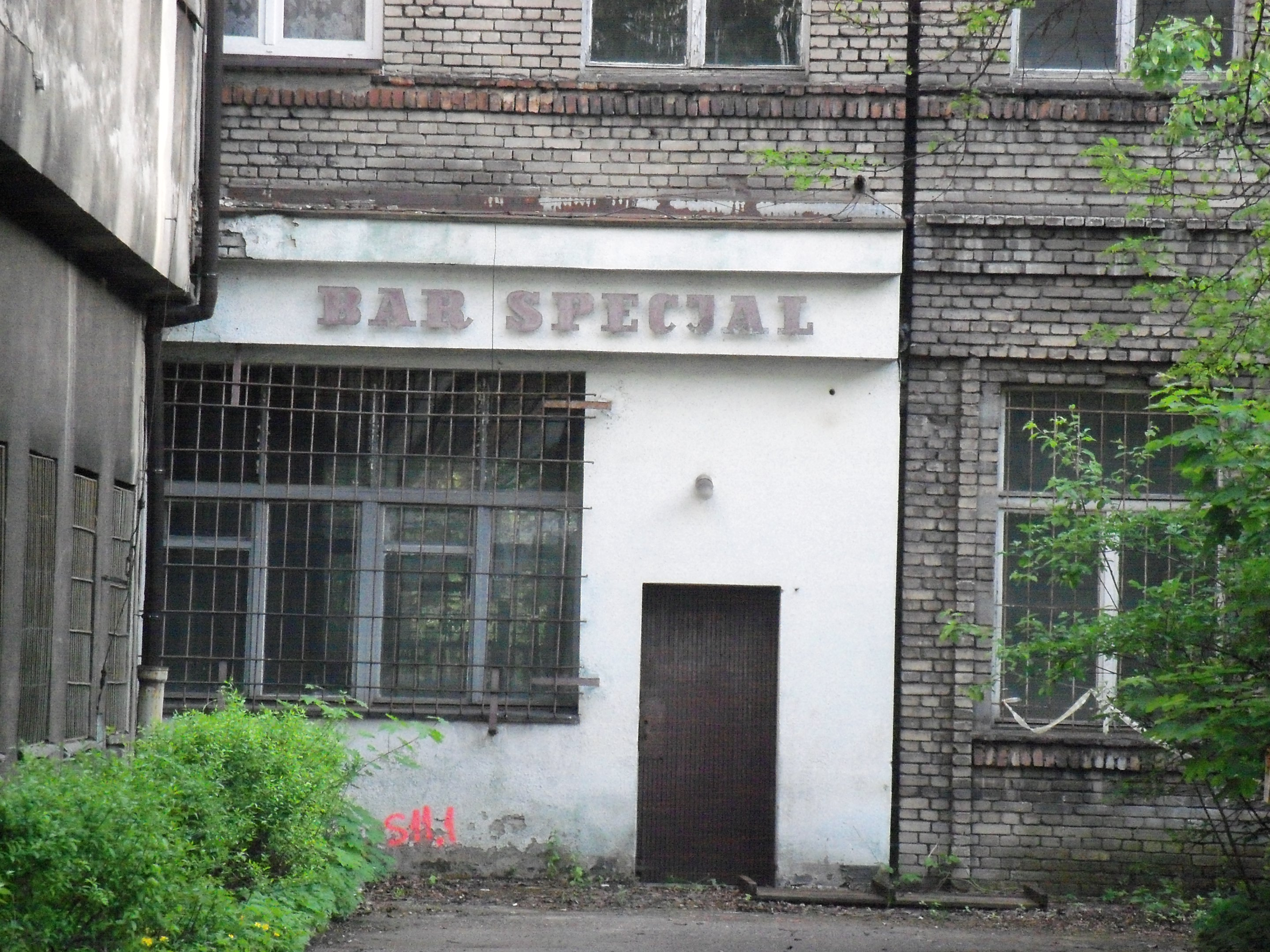 Huta Baildon w Katowicach - bar Specjal